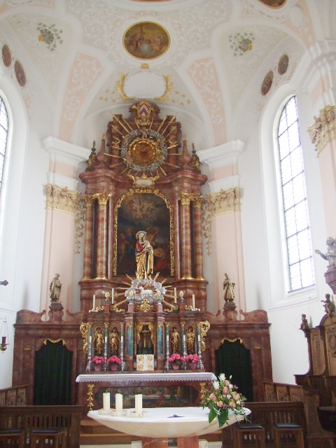 Pfarrkirche St. Kosmas und Damian, Dellmensingen, Gemeinde Erbach (Donau), Alb-Donau-Kreis Hochaltar